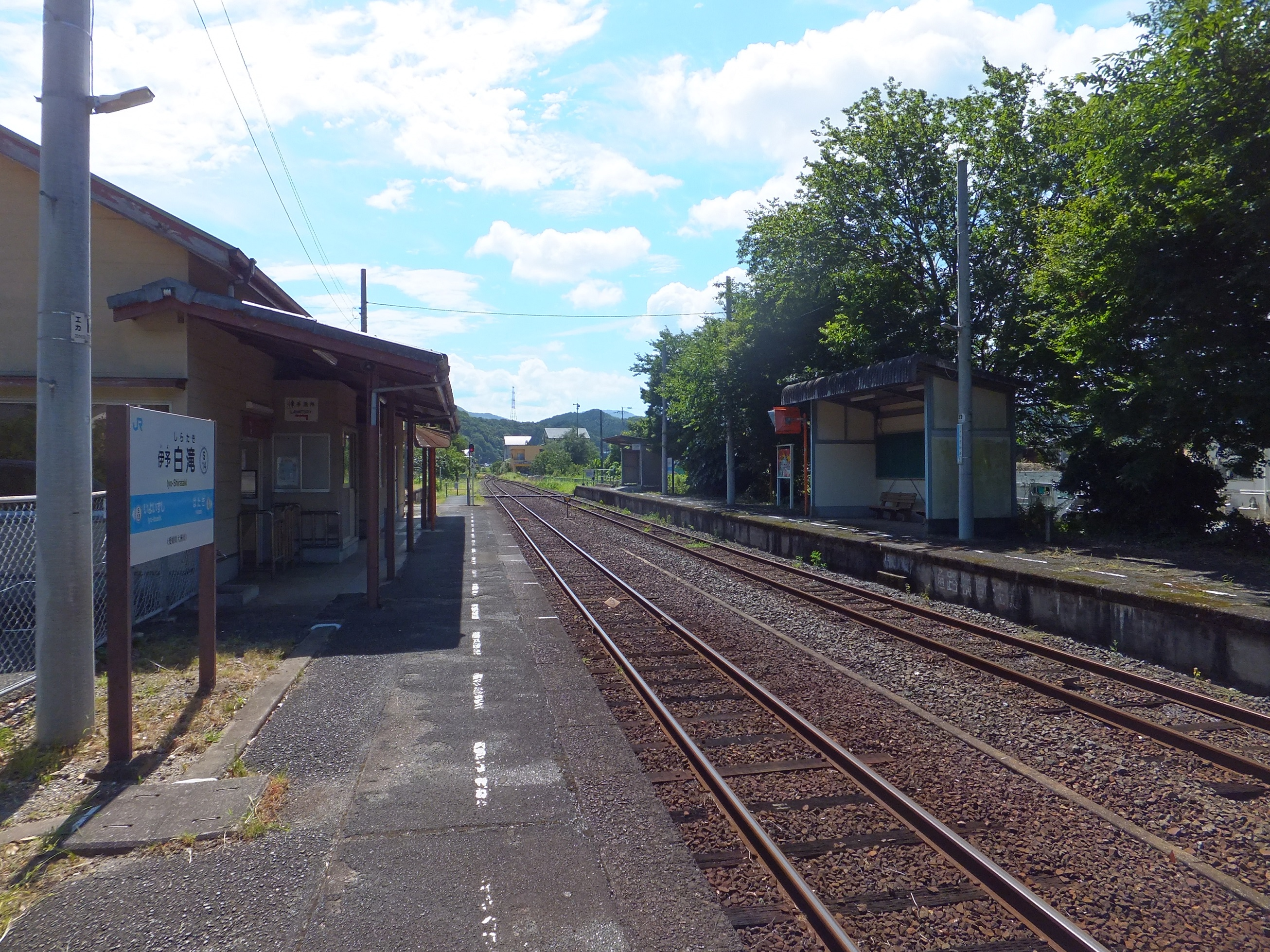 愛媛県大洲市 JR四国予讃線 伊予白滝駅